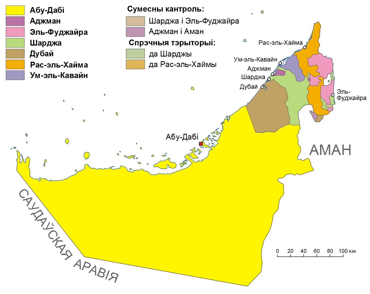 Адміністрацыйны падзел Аб'яднаных Арабскіх Эміратаў